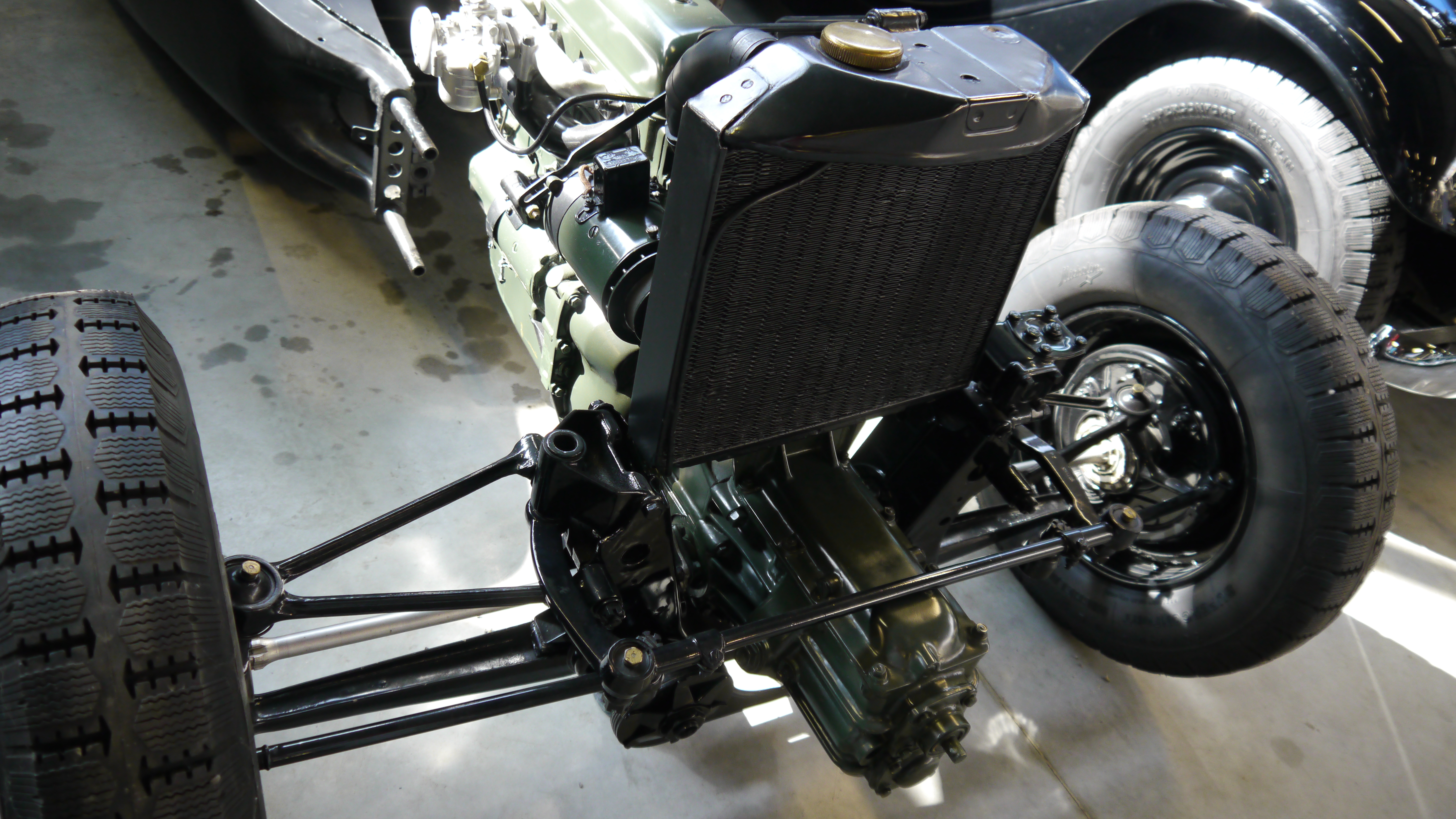 Conservatoire Citroen 064